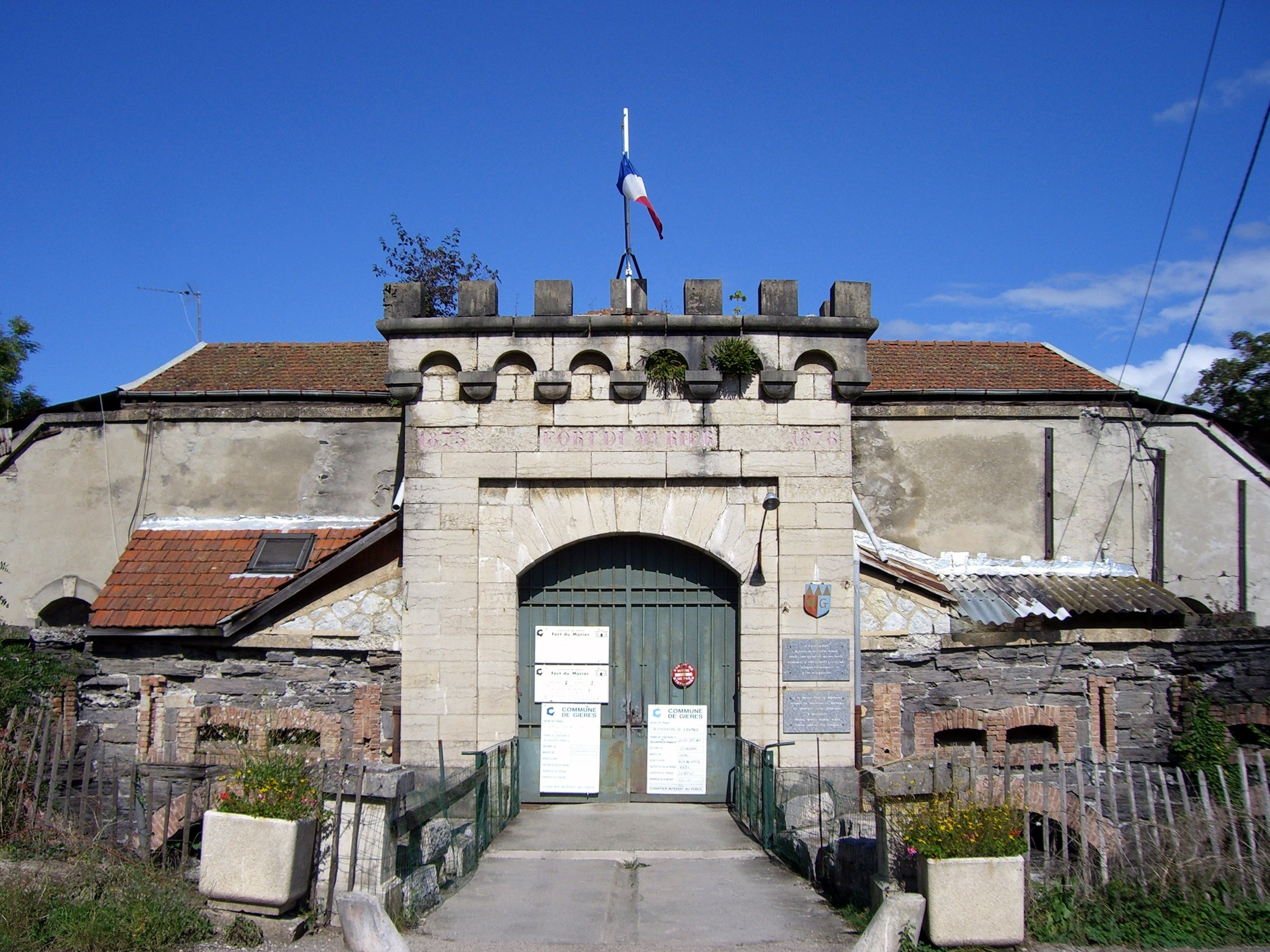 L'entrée principale du Fort du Mûrier sur la commune de Gières.